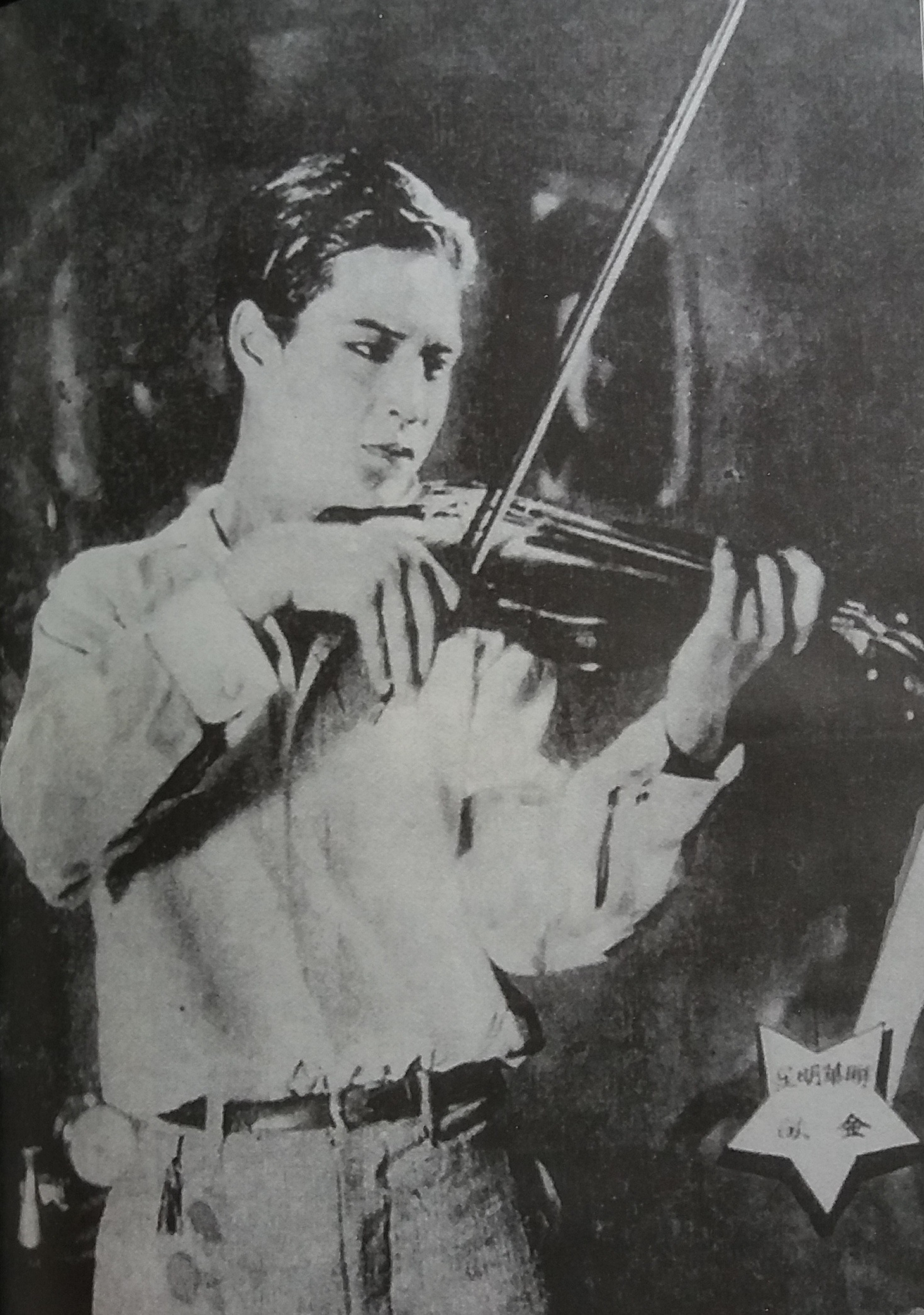 《闲花野草》剧照